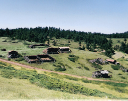 Akkayanın merkezinde bulunan tepecikten akkayanın genel görünümü.Yılmaz karagöl